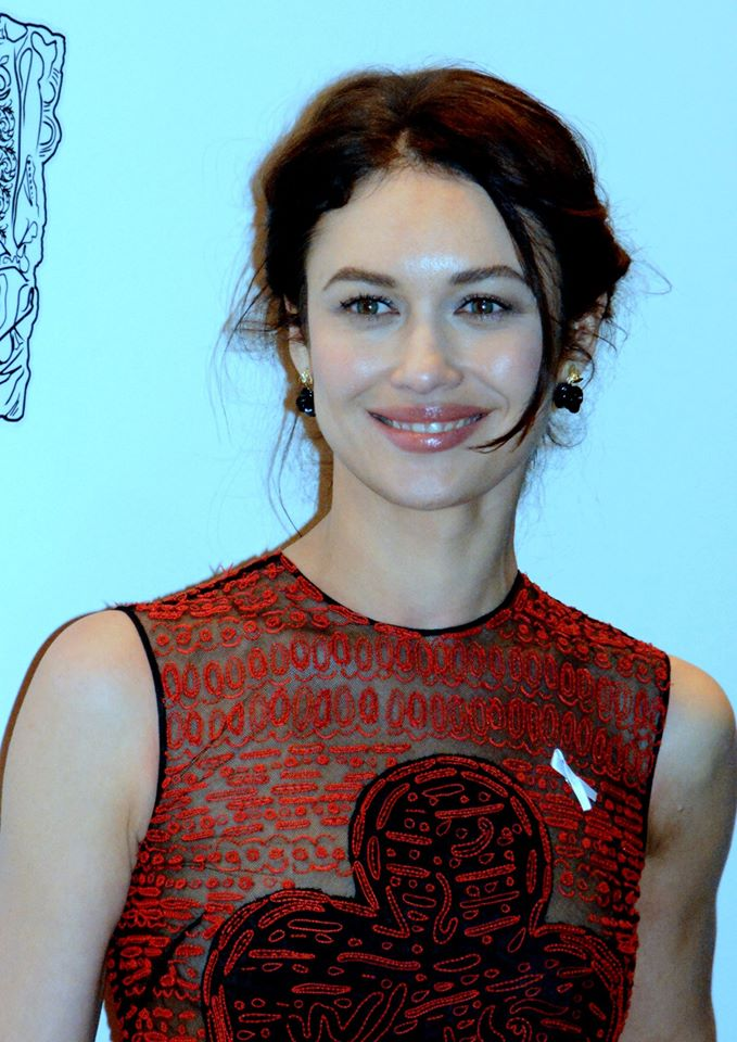 Olga Kurylenko à la cérémonie des César du cinéma